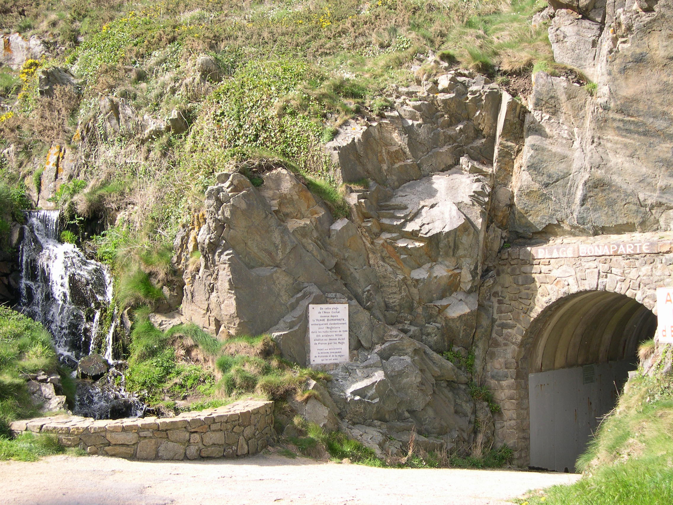 Entrée de la plage Bonaparte, à Plouha.